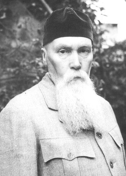 Фотография Николая Константиновича Рериха